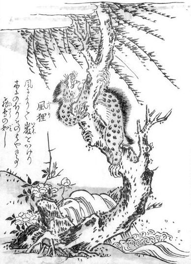 Fūri (風狸) from the Konjaku Hyakki Shūi (今昔百鬼拾遺)